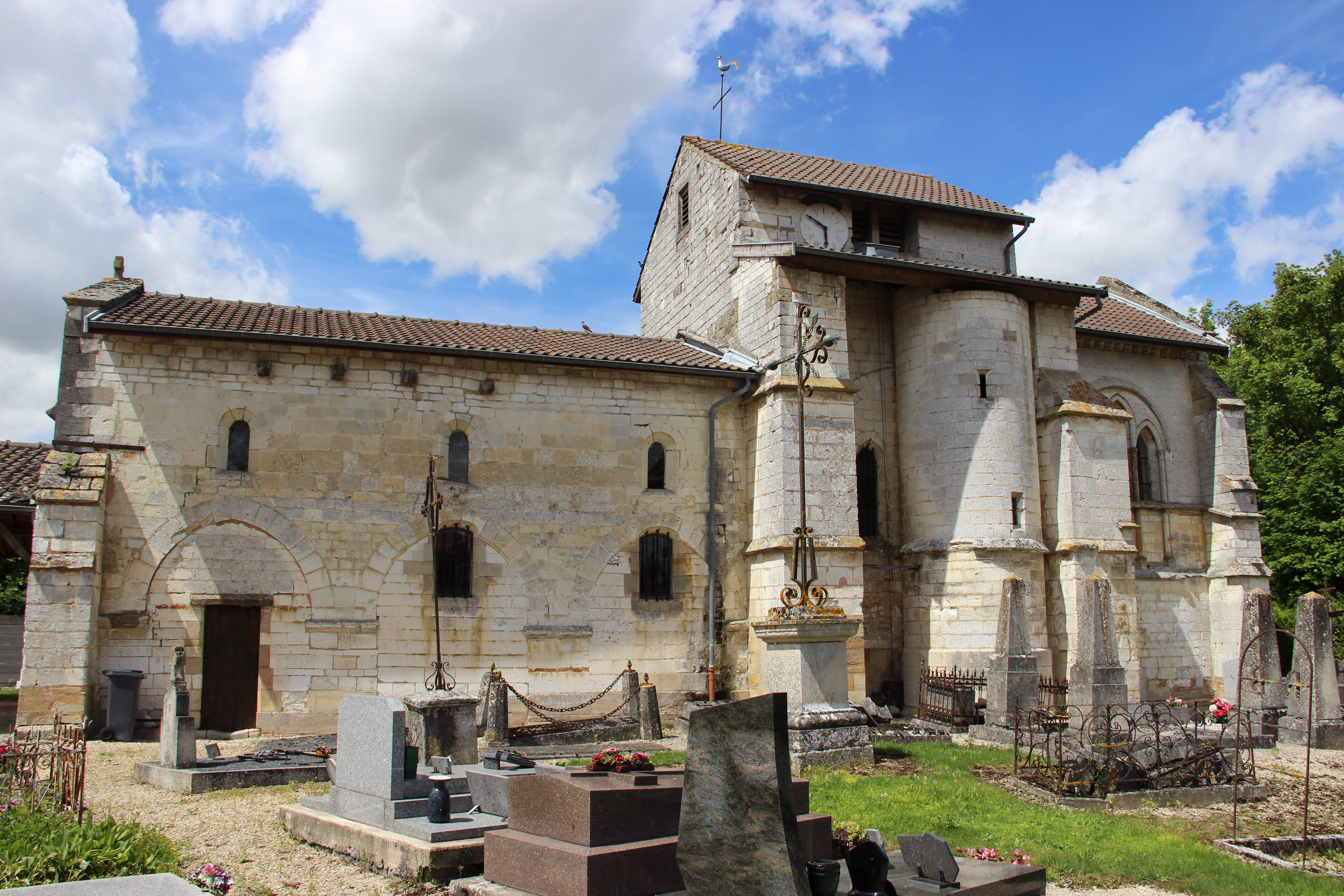 Eglise de Saint-Quentin-les-Marais